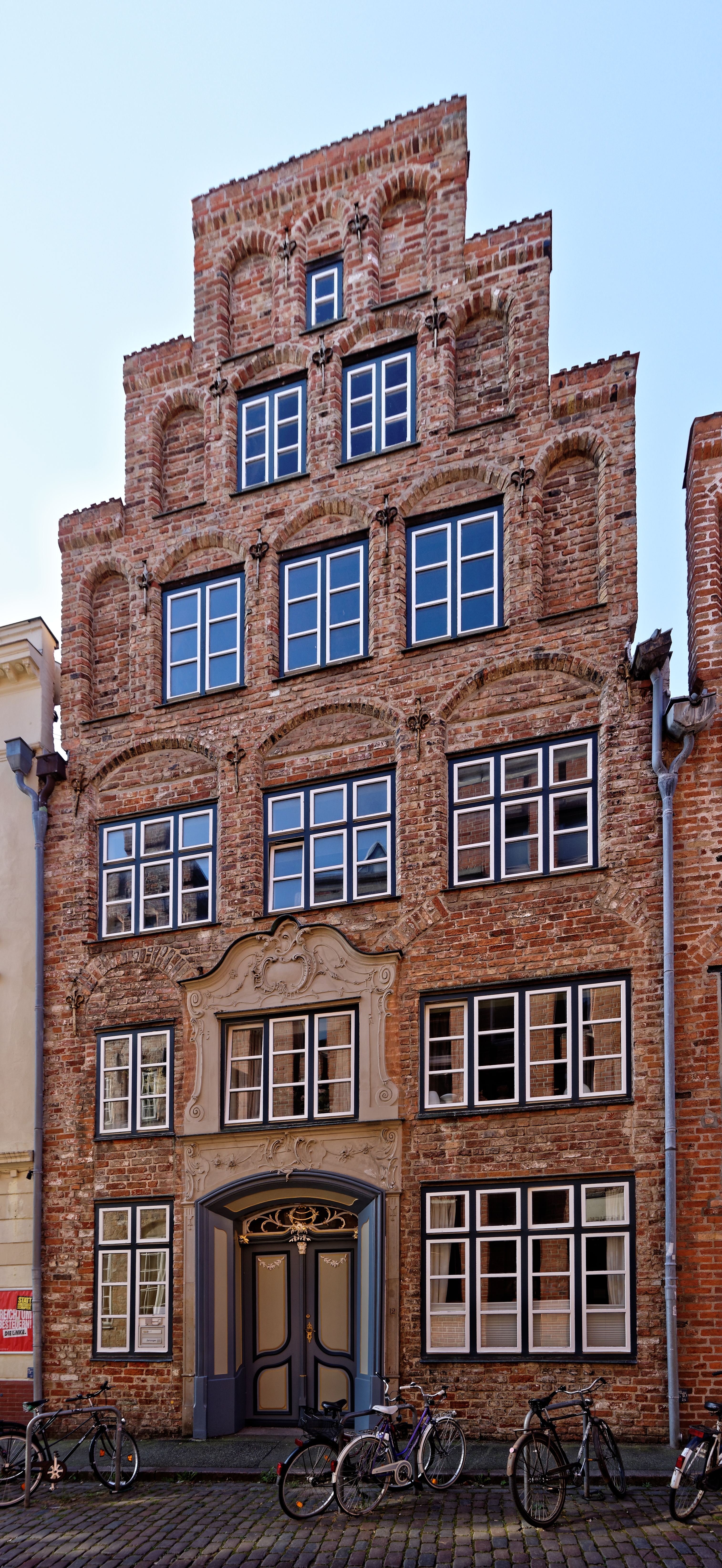 Lübecker Altstadt, Hundestraße 12